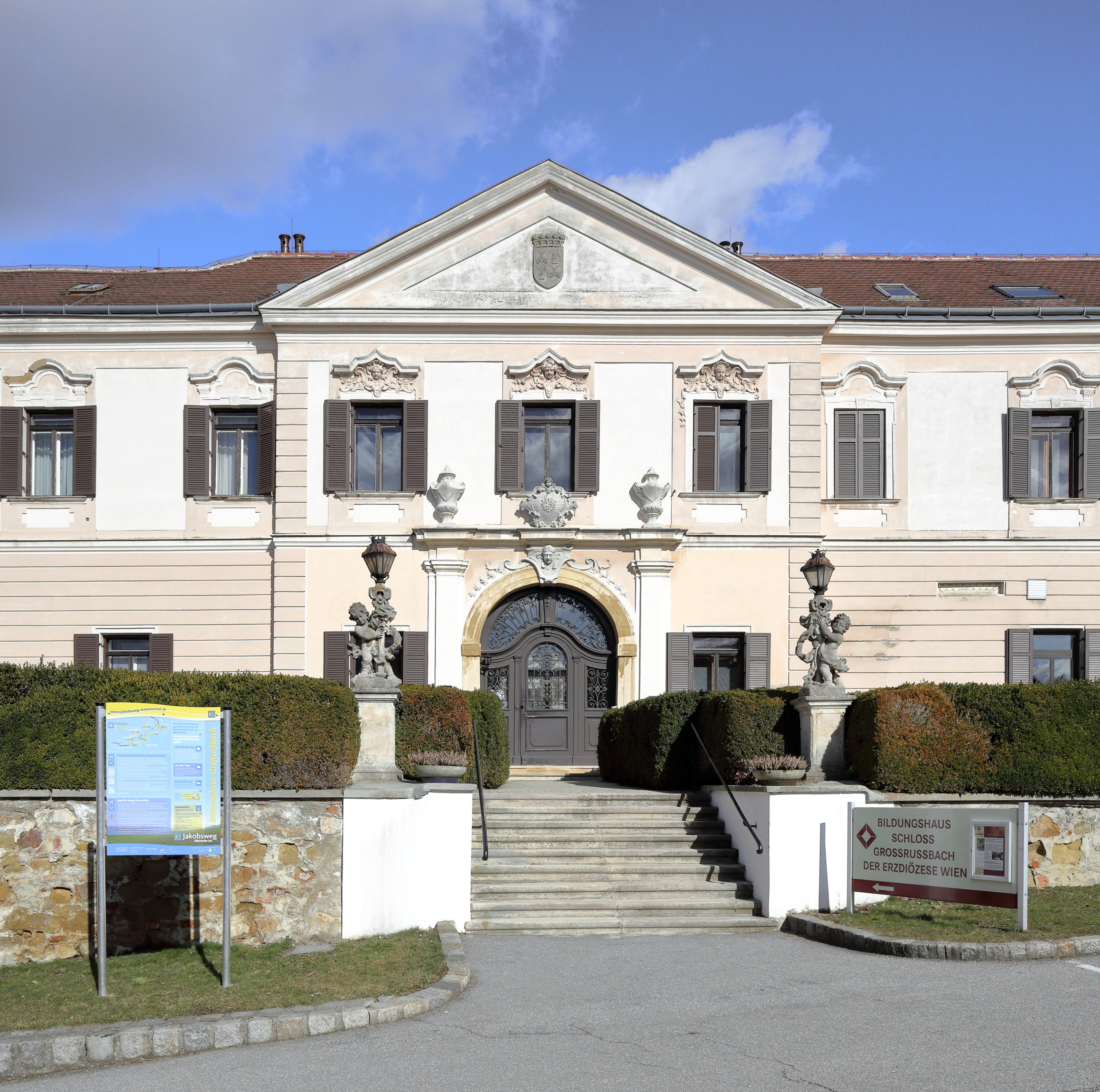 Portal des Schlosses und Bildungshauses der Erzdiözes Wien in der niederösterreichischen Marktgemeinde Großrußbach. Die spätbarocke Fassade stammt lt. Inschrift aus dem Jahr 1739.